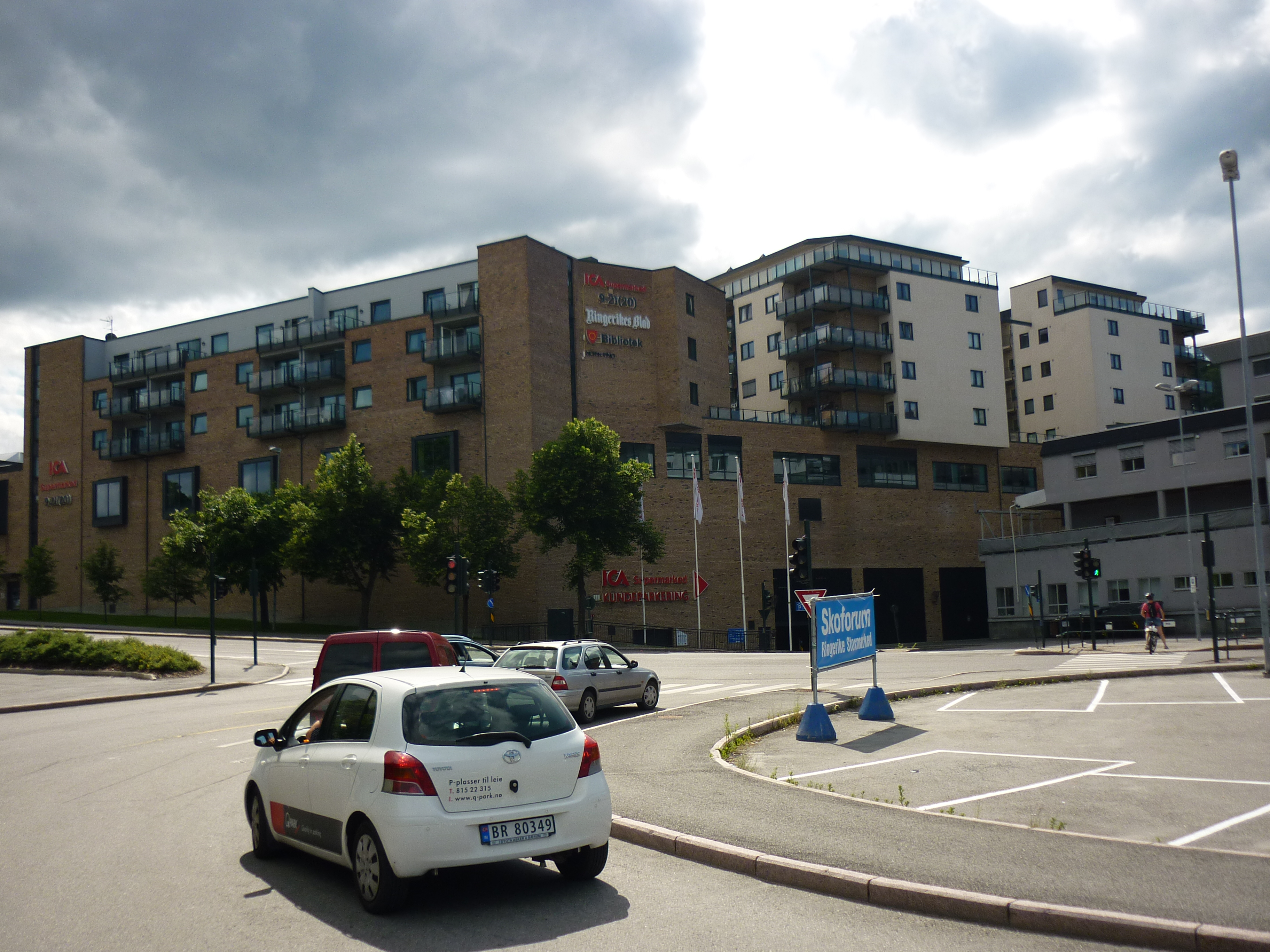 Et næringsbygg i Hønefoss, som blant annet huser tre kinosaler, biblioteket, flere butikker og omsorgsleiligheter oppover i etasjene.